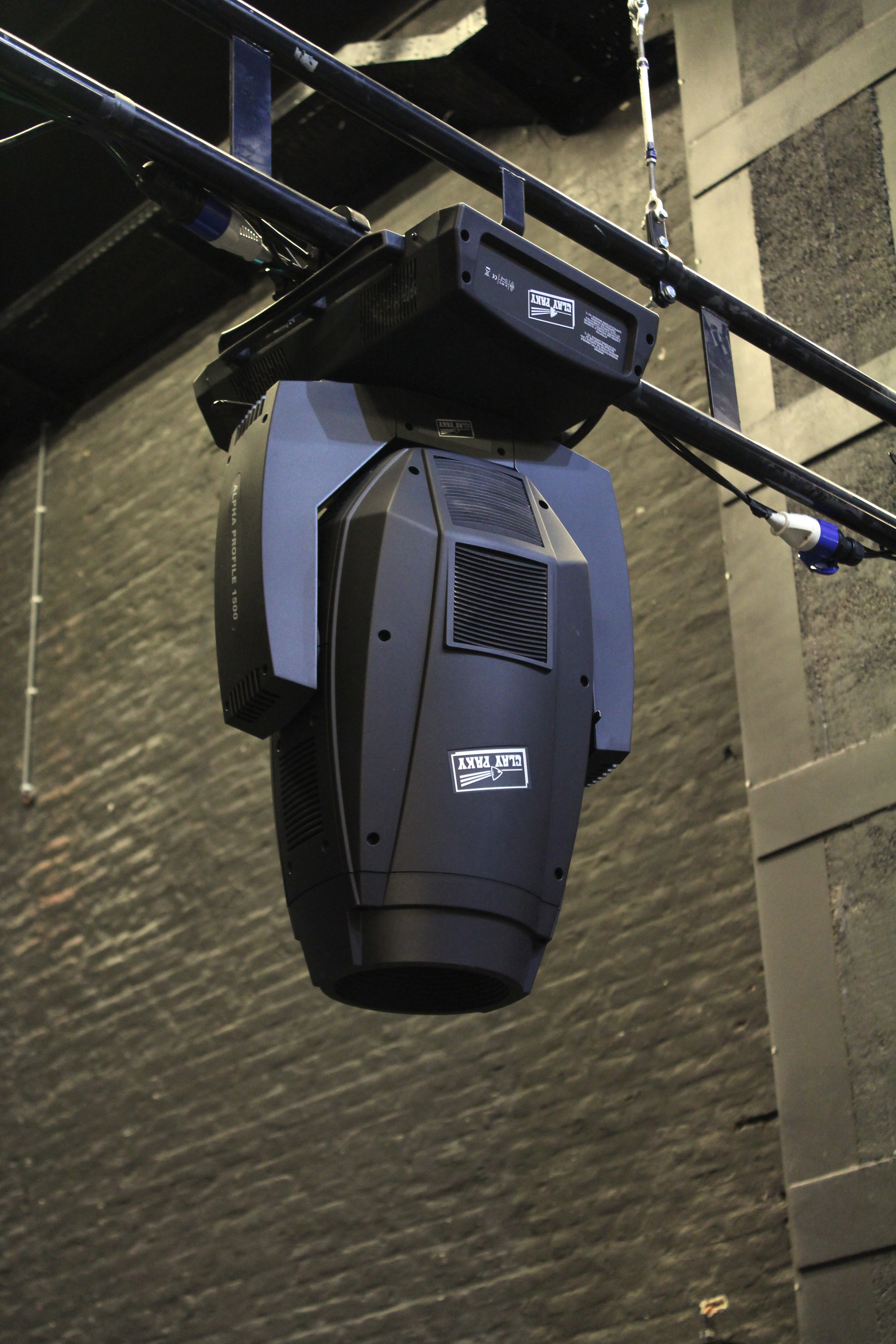 Projecteur à commande électronique Alpha profile 1500 sur la scène de l'Opéra Royal de Wallonie.